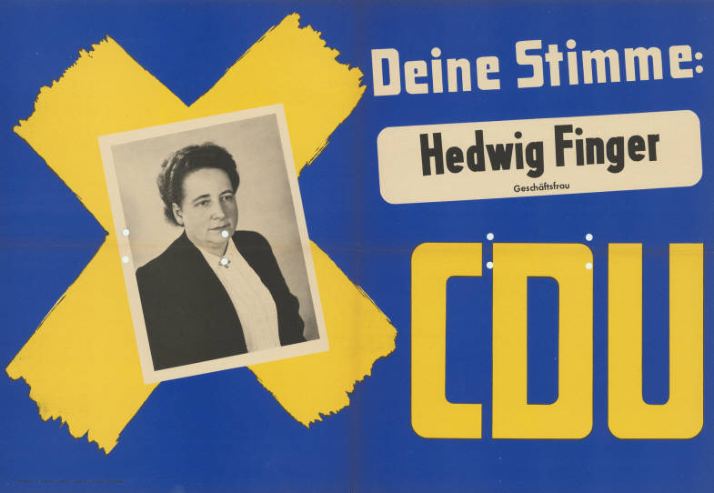 Deine Stimme: Hedwig Finger Geschäftsfrau CDUAbbildung:Porträtfoto - StimmkreuzPlakatart:Kandidaten-/Personenplakat mit PorträtDrucker_Druckart_Druckort:Bilddruck u. Klischee Lambert Lensing G.m.b.H., DortmundObjekt-Signatur:10-009 : 159Bestand:Landtagswahlplakate Nordrhein-Westfalen (10-009)GliederungBestand10-18:Landtagswahlplakate Nordrhein-Westfalen (10-009) » Landtagswahl am 18.6.1950 » CDU » mit PorträtfotoLizenz:KAS/ACDP 10-009 : 159 CC-BY-SA 3.0 DE